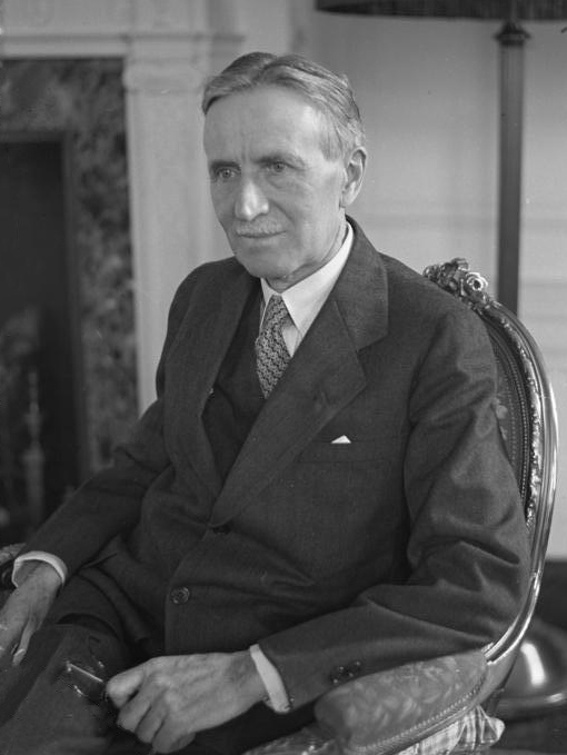 Der amerikanische Gummikönig und Multimillionär Harwey Firestone ist zu Besuch in Berlin eingetroffen. Er ist der grösste Landbesitzer Liberias, wo er über 1 Million Morgen Land für Gummipflanzungen erwarb. Porträt des amerikanischen Multimillionärs Harwey Firestone.